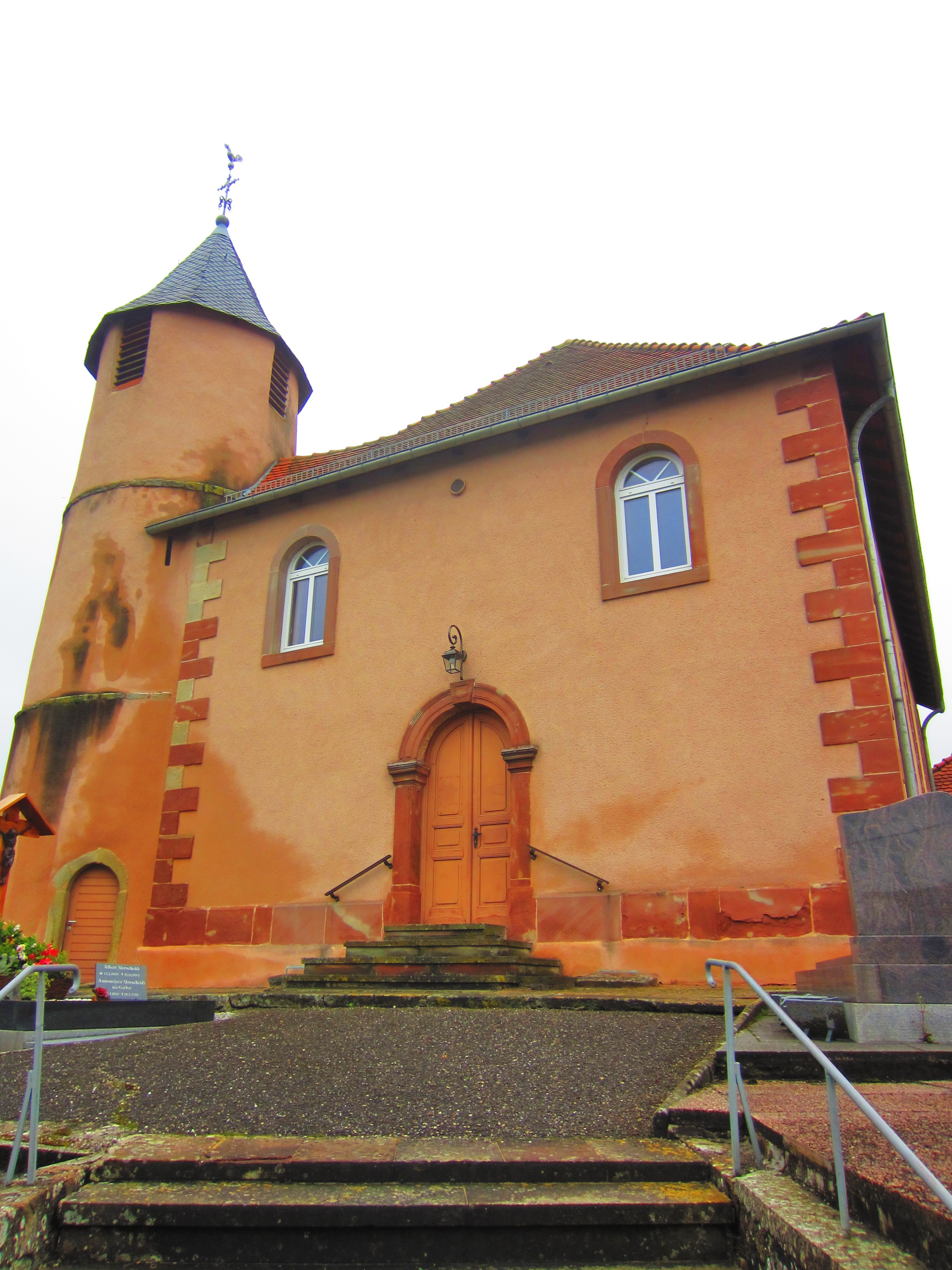 Eglise Metting